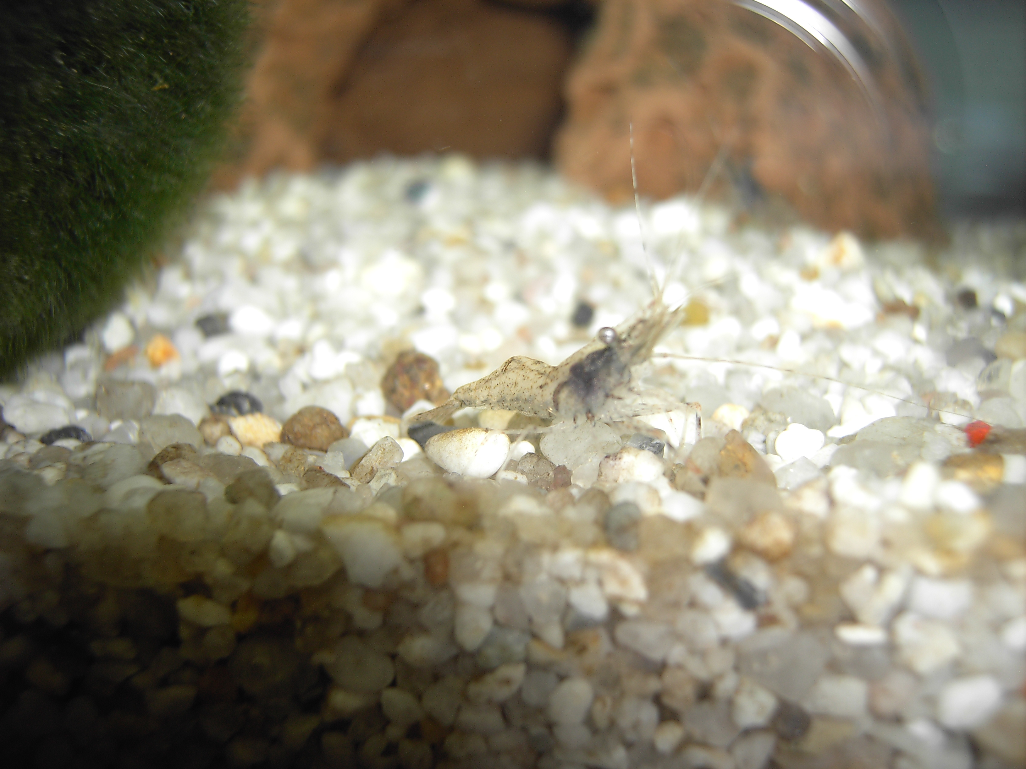 Macrobrachium assamense, approx 3 weeks old